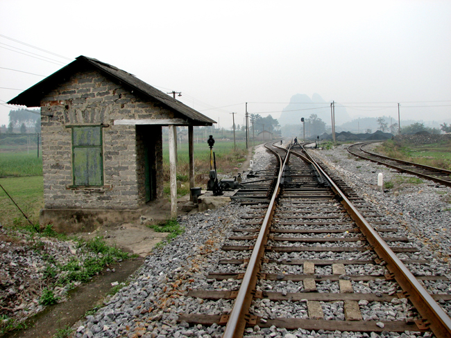 河里乡火车站